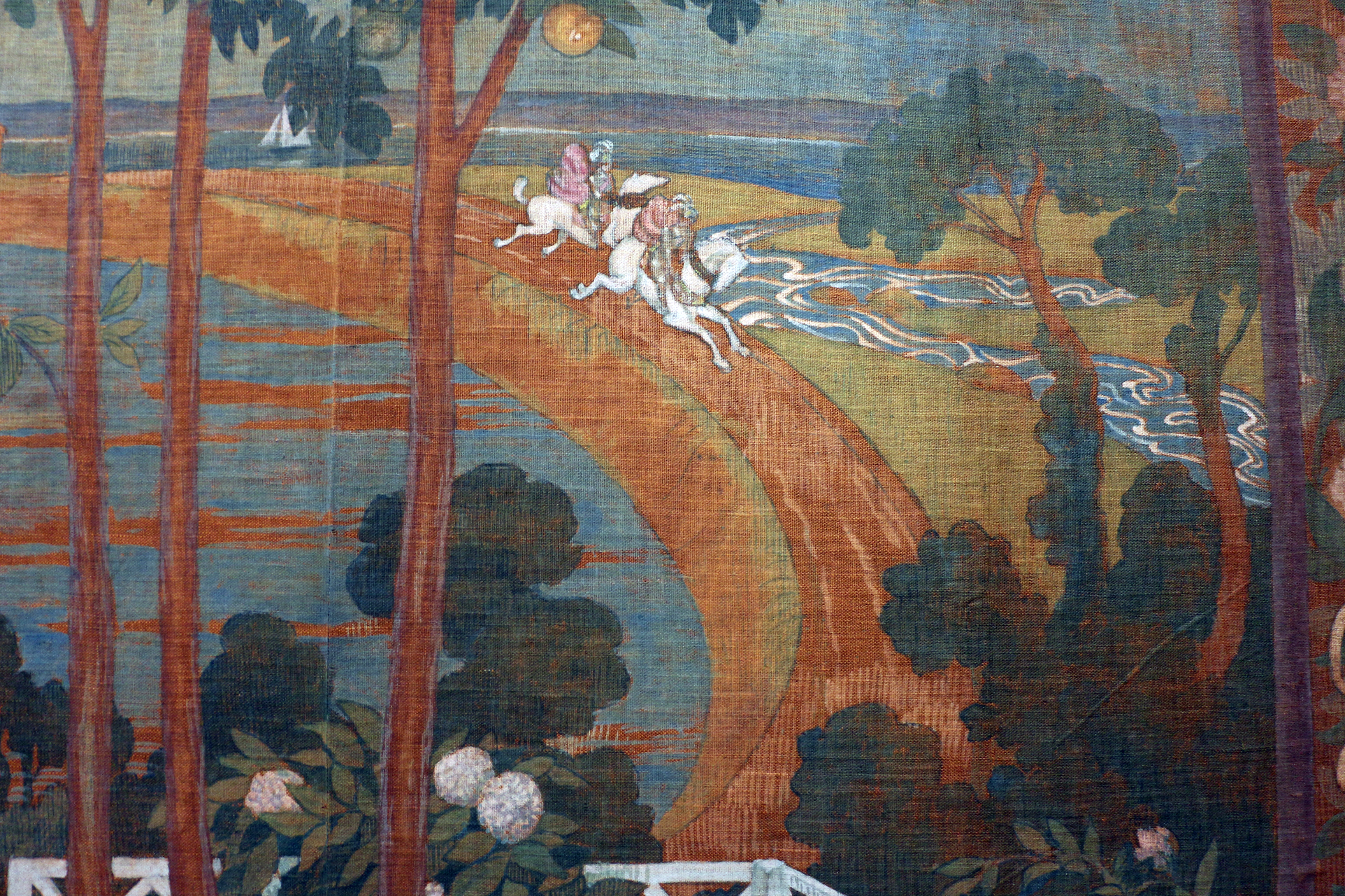 leggenda di cavalleria o tre giovani principesse (modello per arazzo)title QS:P1476,it:"leggenda di cavalleria o tre giovani principesse (modello per arazzo)" label QS:Lit,"leggenda di cavalleria o tre giovani principesse (modello per arazzo)"